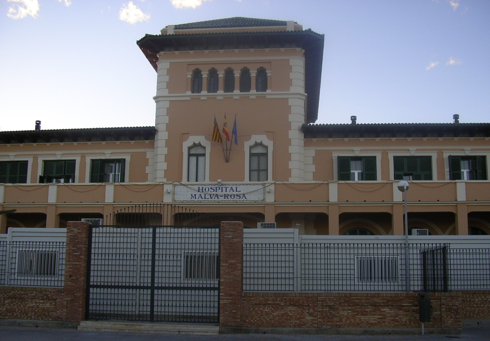 Hospital_Malva-Rosa,_ciutat_de_València